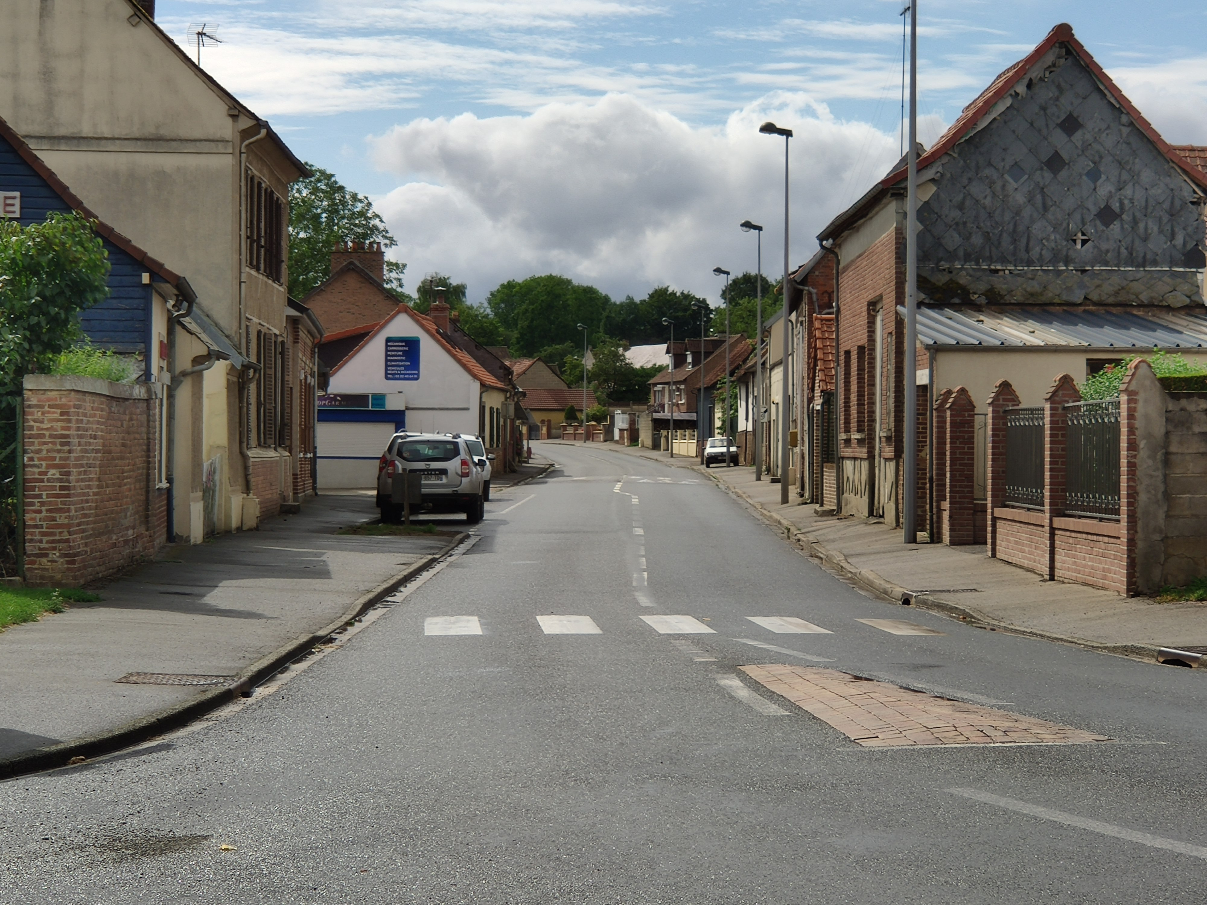 Contay : La Grande rie; ancienne route nationale RN 319 et actuelle RD 319